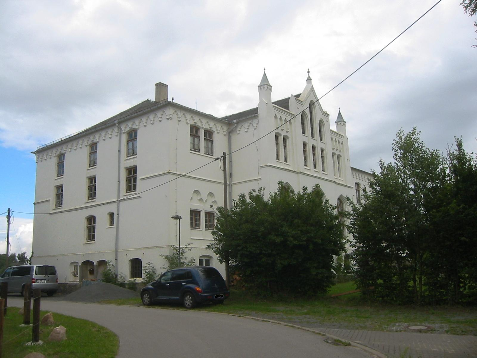 Seitenansicht des denkmalgeschützten Gutshauses in Klein Kussewitz ("Schloss K")